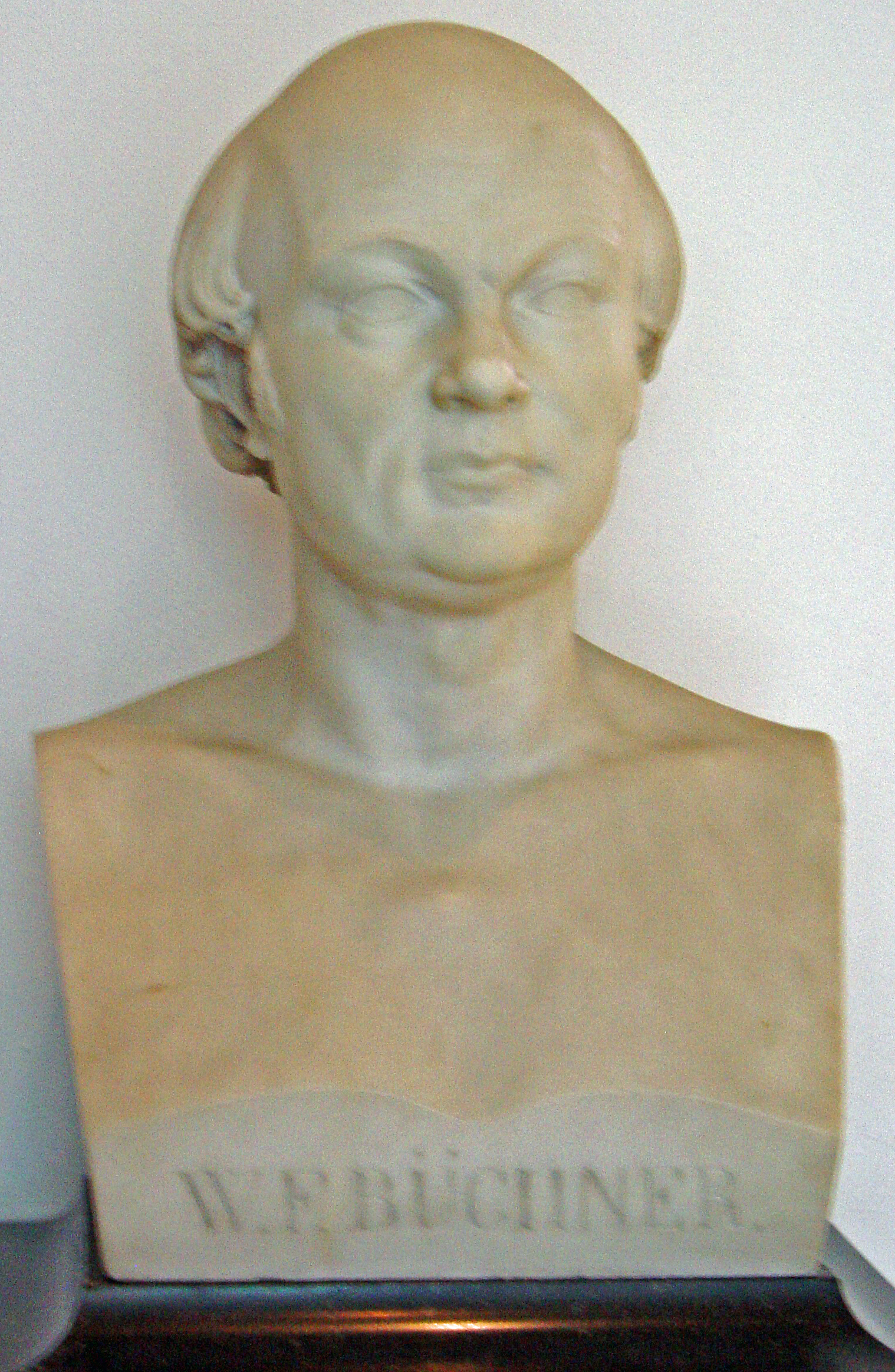 Borstbeeld Willem Frederik Büchner gemaakt door Jan Antonie van der Ven in het Catharina Gasthuis te Gouda gemaakt op nl:24 mei nl:2006 (datum- en tijdinstelling op camera was niet juist). Licensing Categorie:Afbeelding Gouda